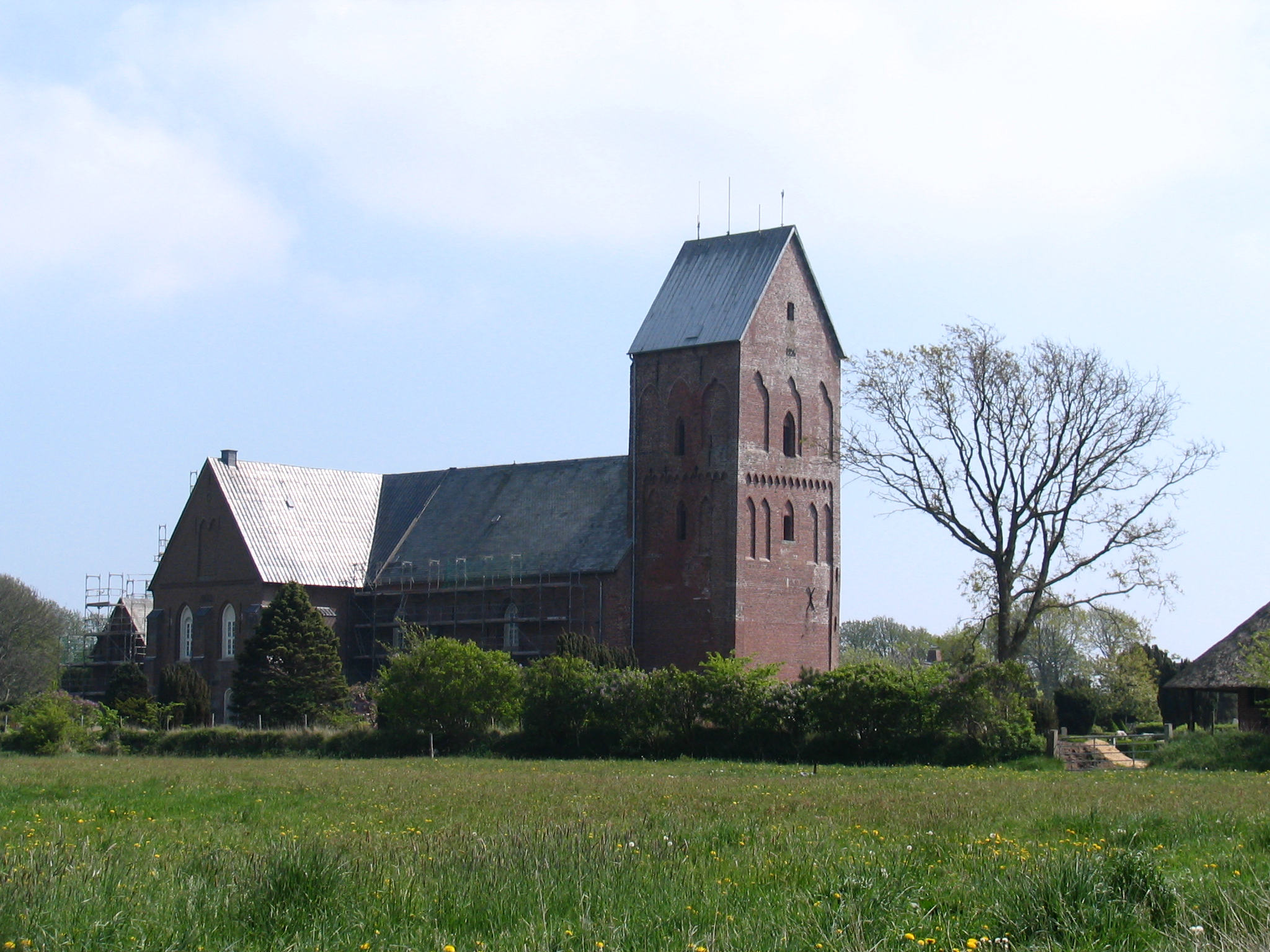 Nordansicht St. Johannis-Kirche in Nieblum auf Föhr